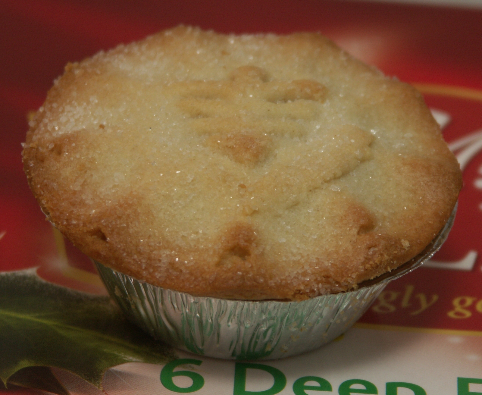 Mince pie